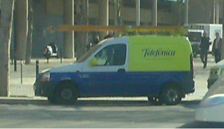 Telefonica car in Barcelona.